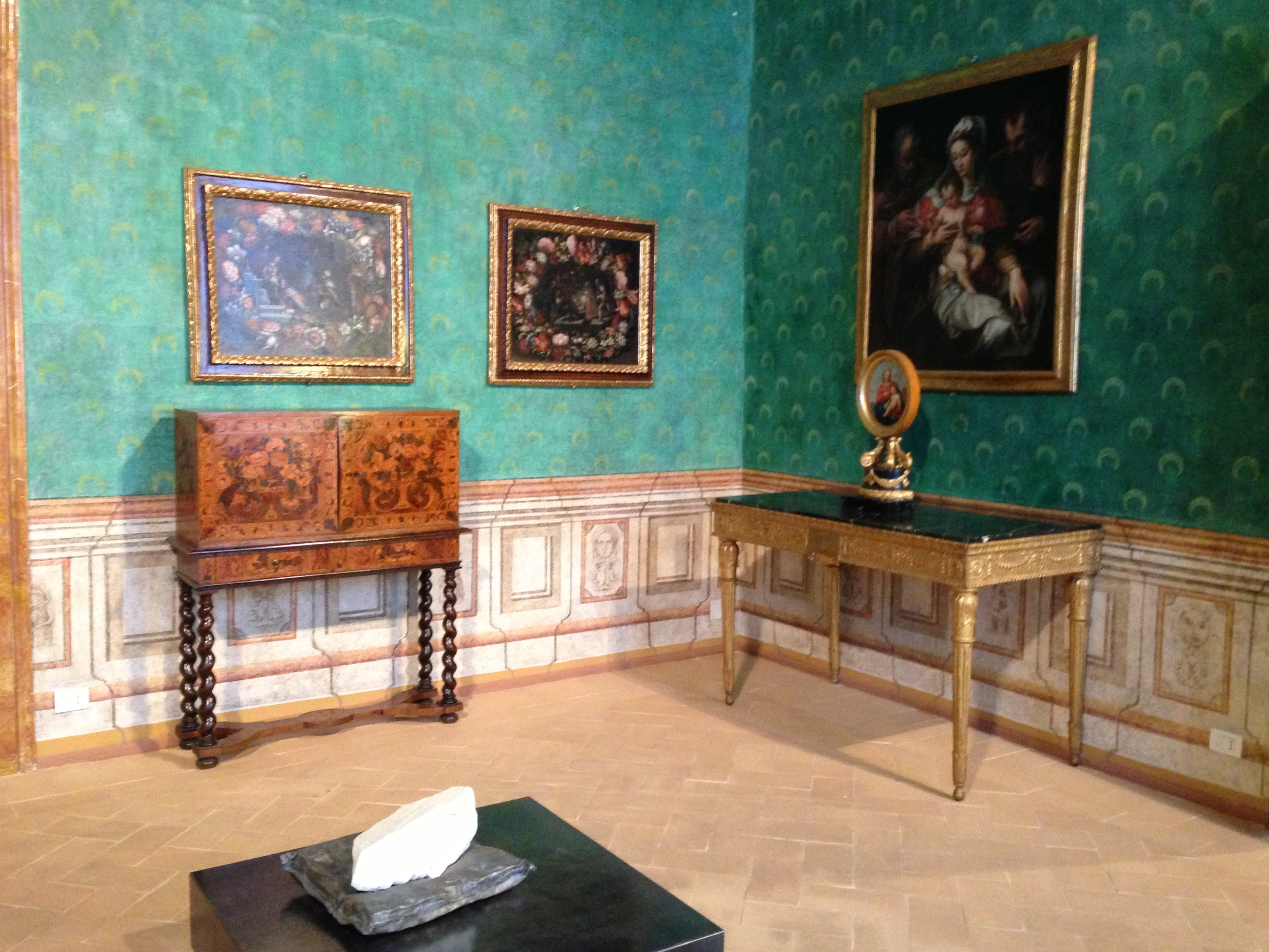 Salone gentilizio del Piano Nobile al primo piano del Museo Carandente, Palazzo Collicola - Arti visive, Spoleto